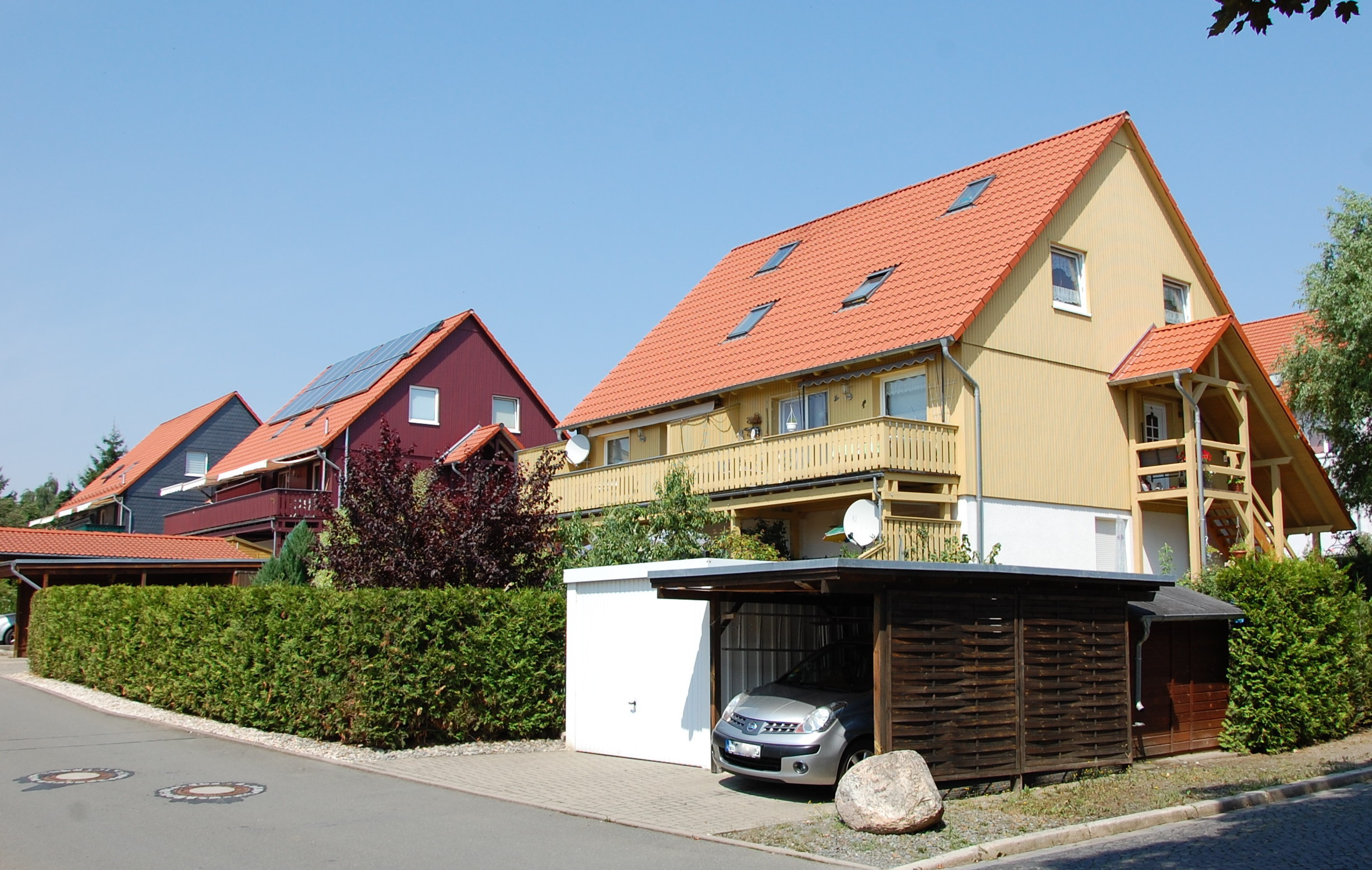 Taubenbreite Neubebauung (Quedlinburg)